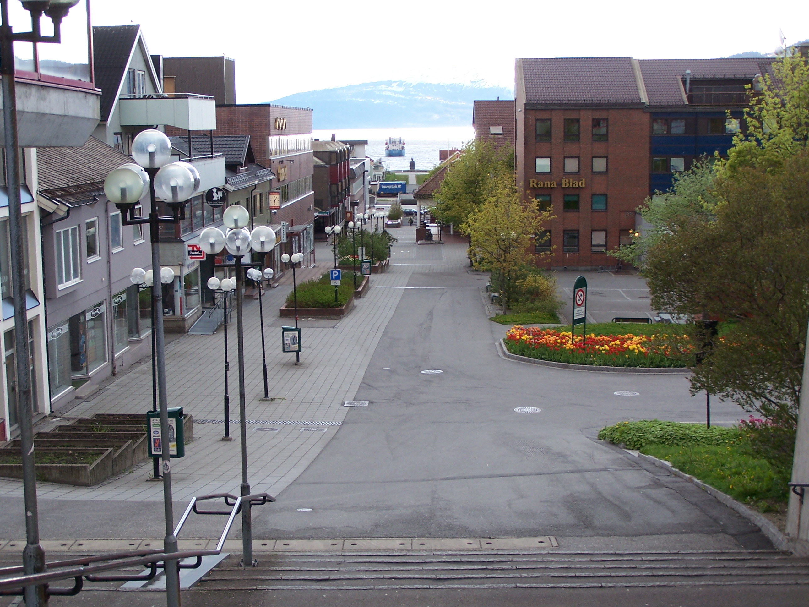 Mo i Rana - Blick durch die Fußgängerzone bis zum Hafen